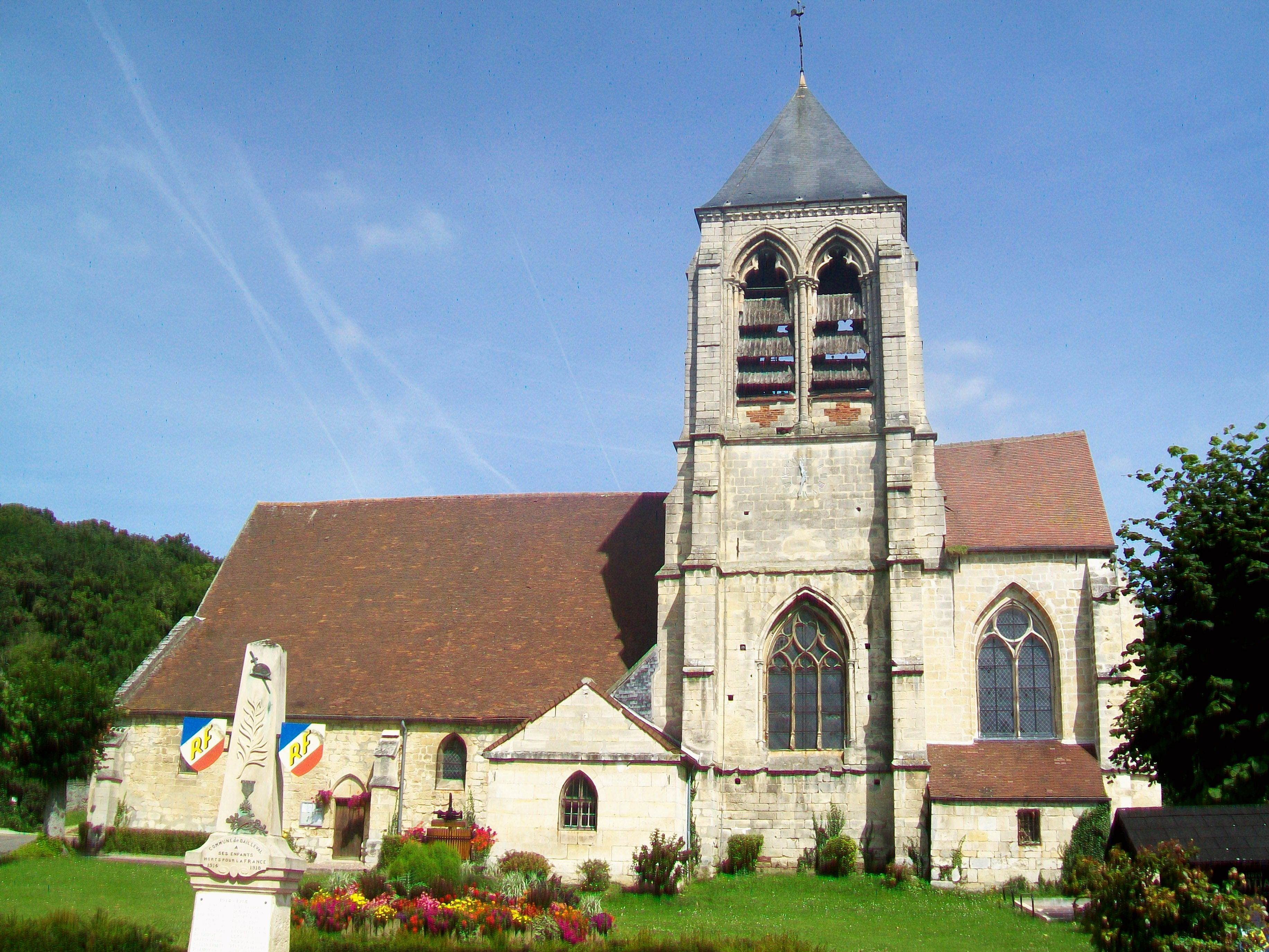 L'église Saint-Martin de Bailleval.